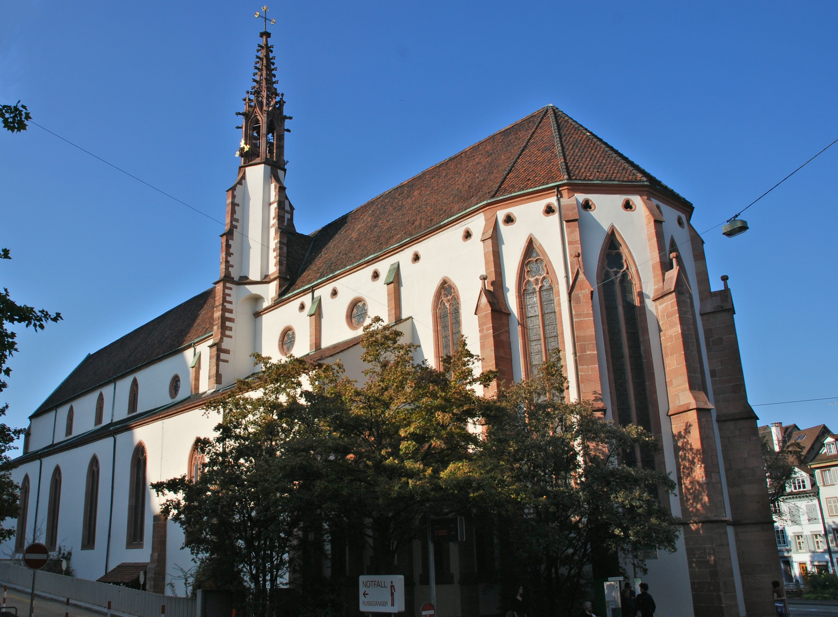 Christkatholische Predigerkriche in Basel